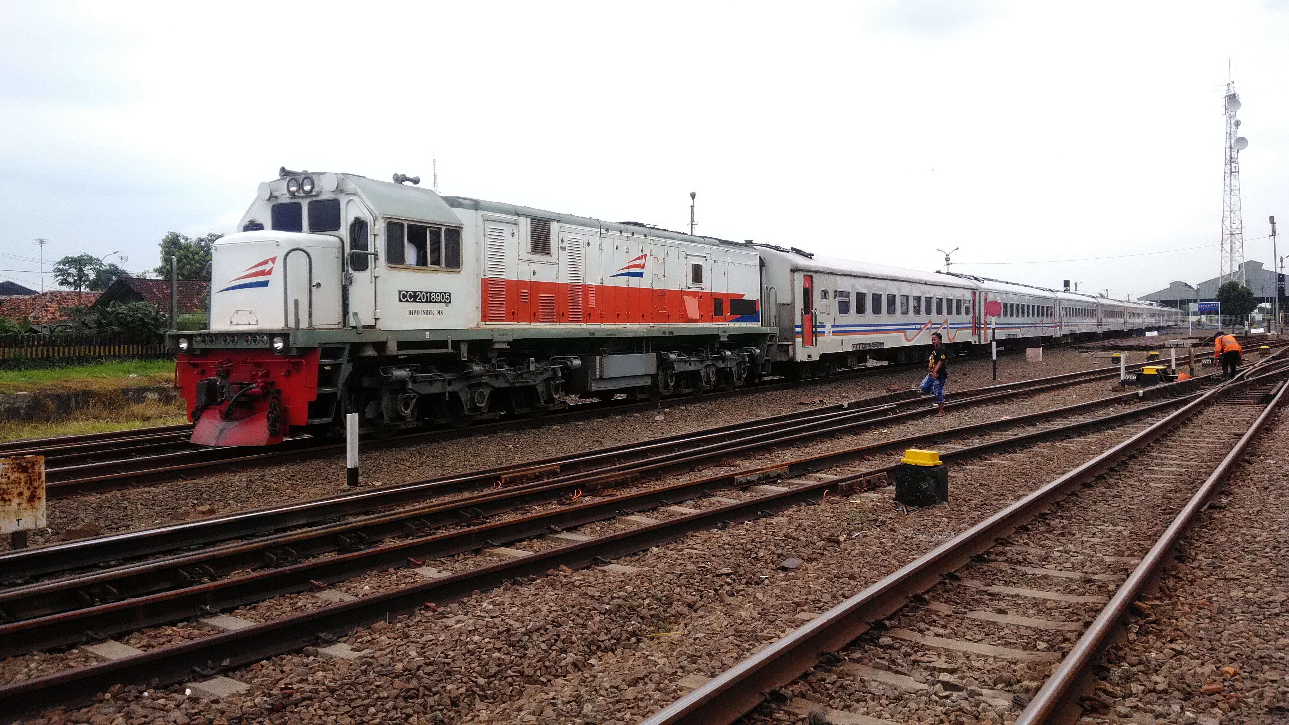 Basa Sunda: Karéta Api Gaya Baru Malam Selatan ngaliwatan Stasion Cikampék